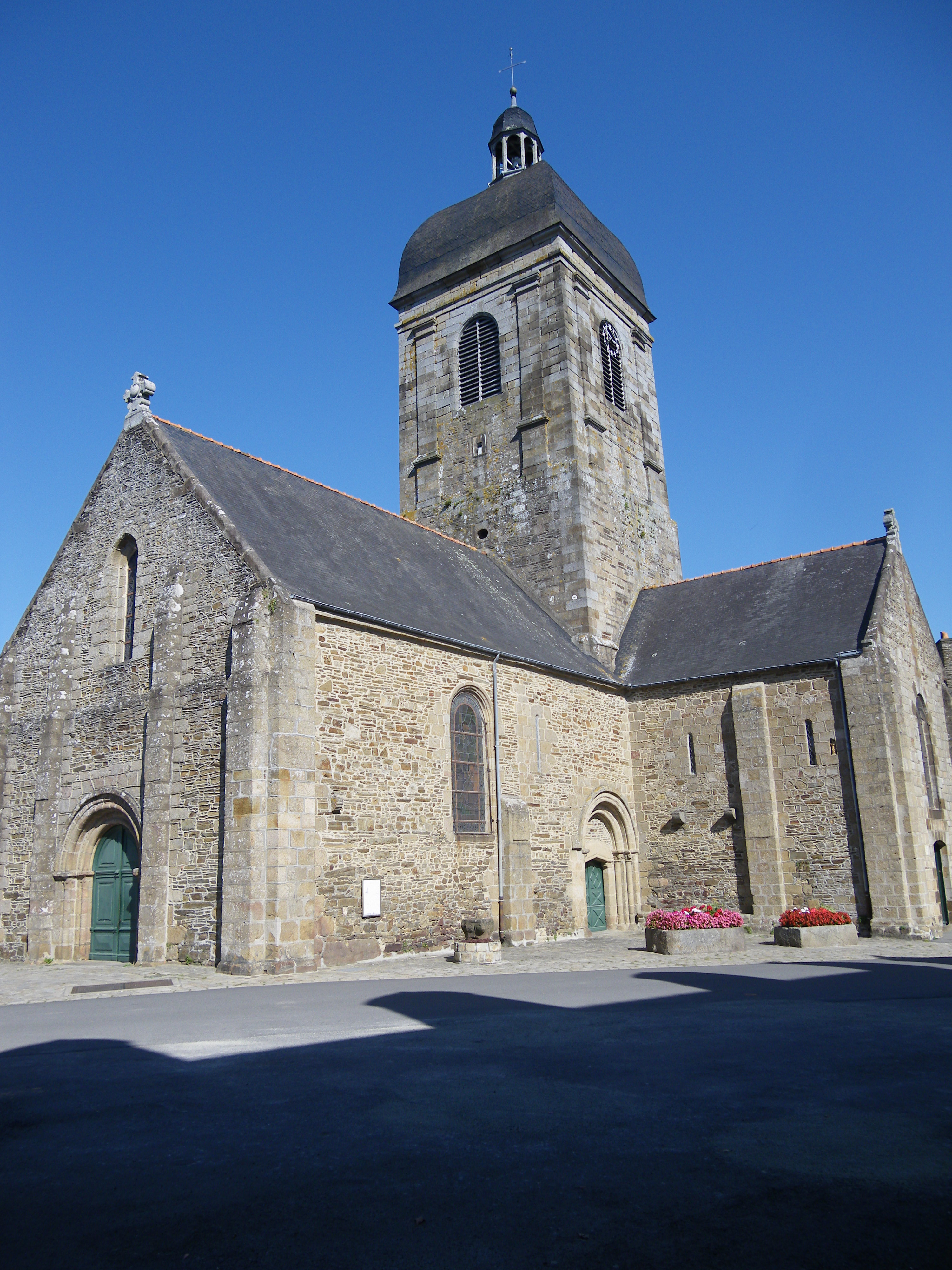 l'eglise d'antrain